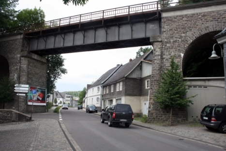 Das 2008 abgerissene Viadukt Drolshagen.